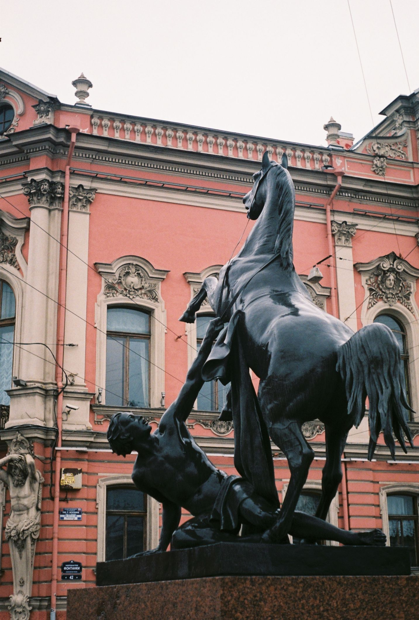 Группа №3 на Аничковом мосту: конь одолевает водничего. Фотография сделана дождливым утром 8 мая, отблески света на влажной поверхности скульптуры, фигура человека на углу здания подчеркивают напряженность ситуации, выраженной П.КлодтомUnknown